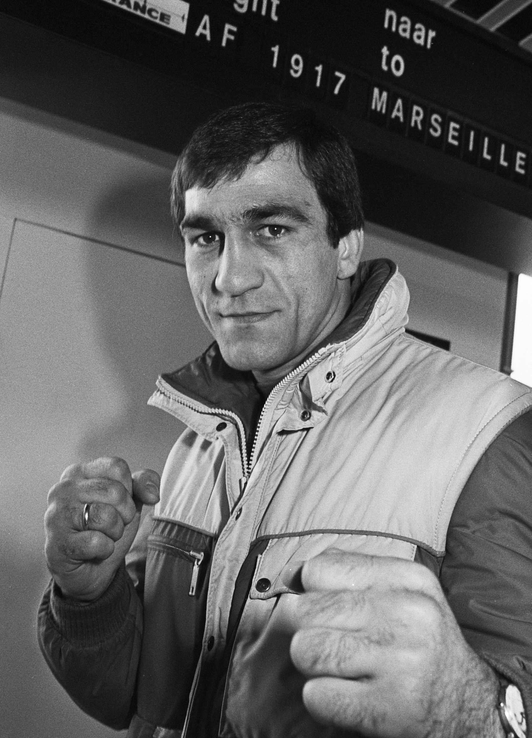 Aankomst op Schiphol van Franse bokser Richard Caramanol tegenstander van Alex Blanchard